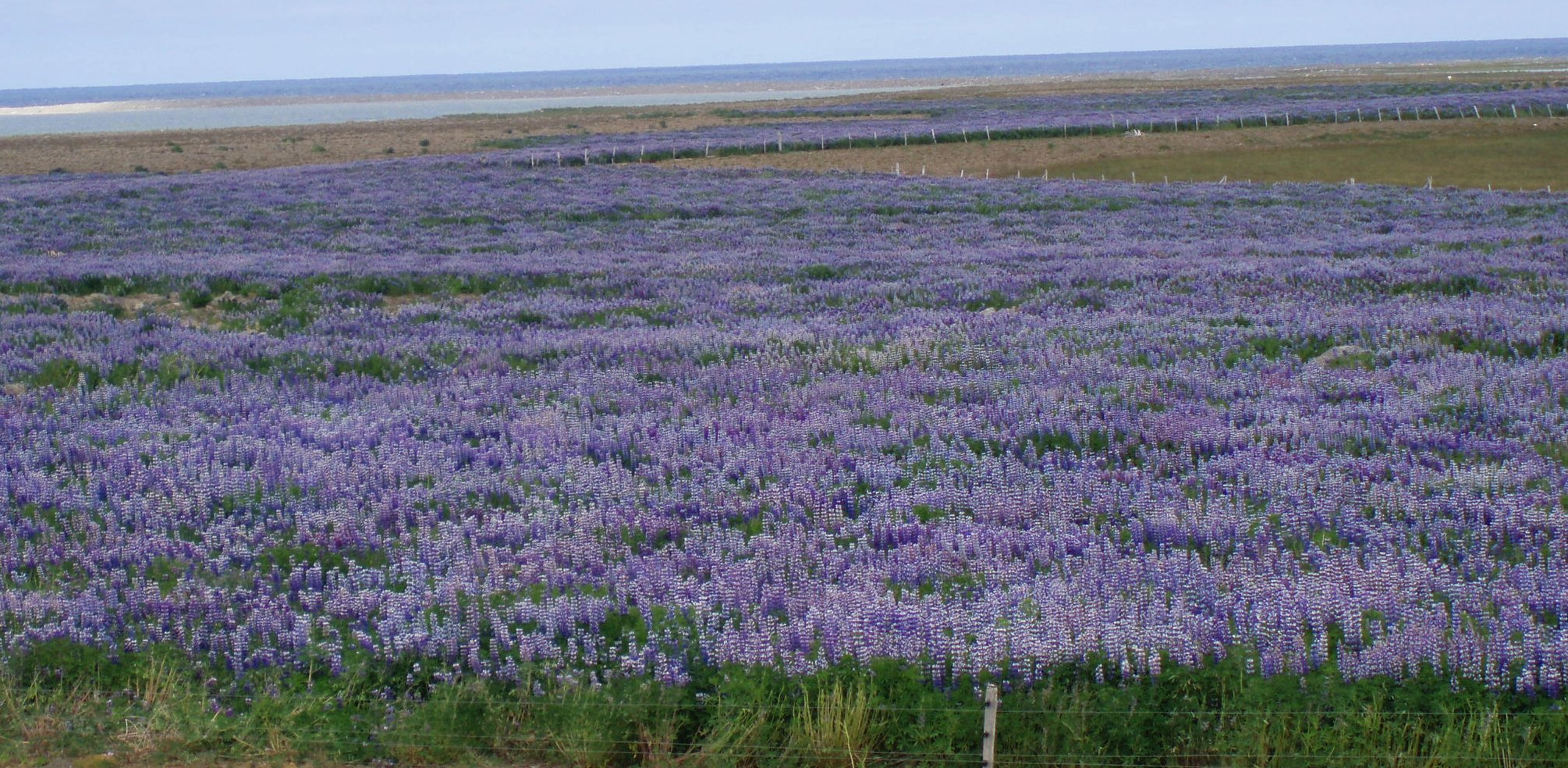 Lupinus nootkatensis (Alaska-Lupine) in Iceland